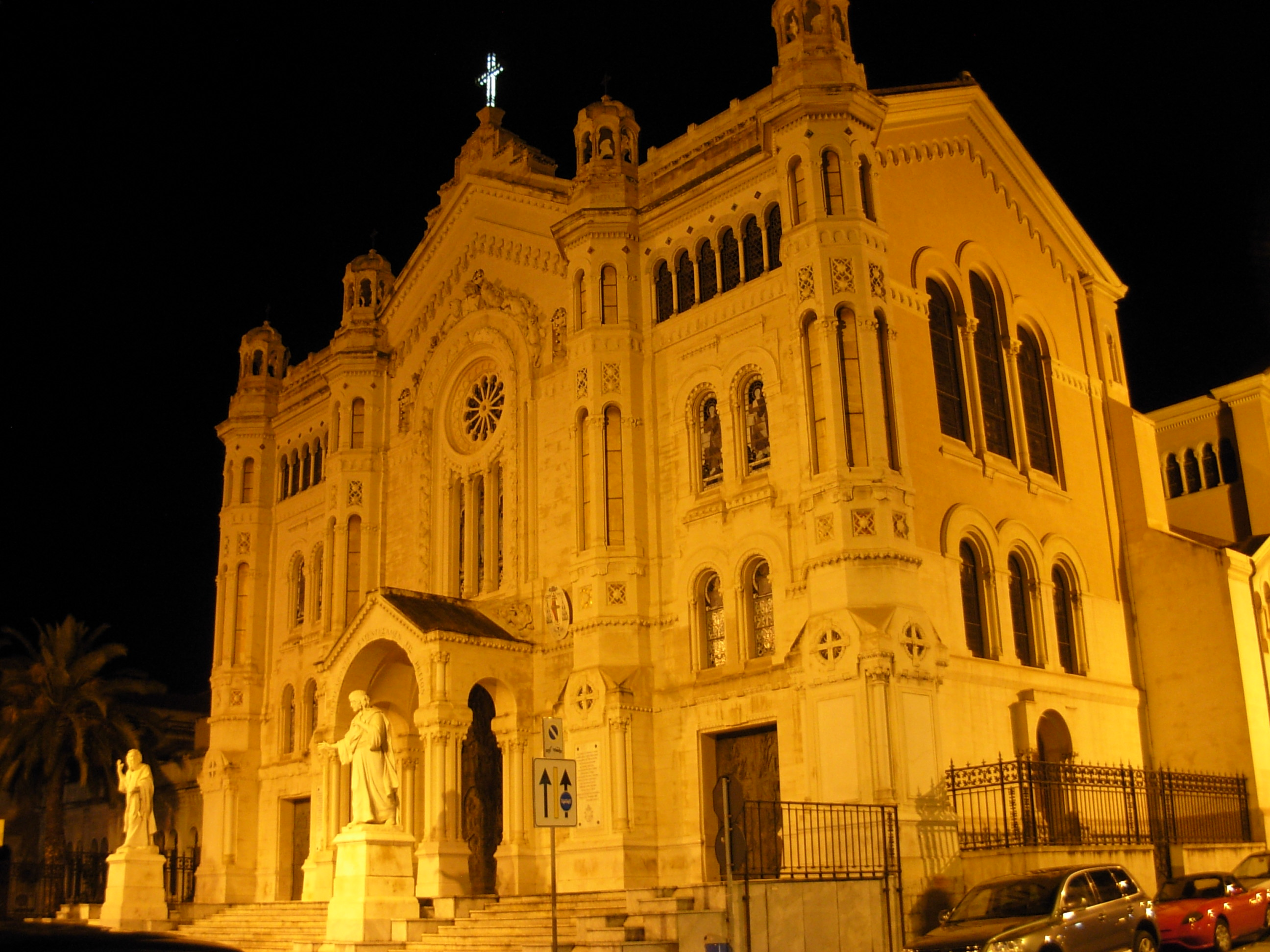 Duomo